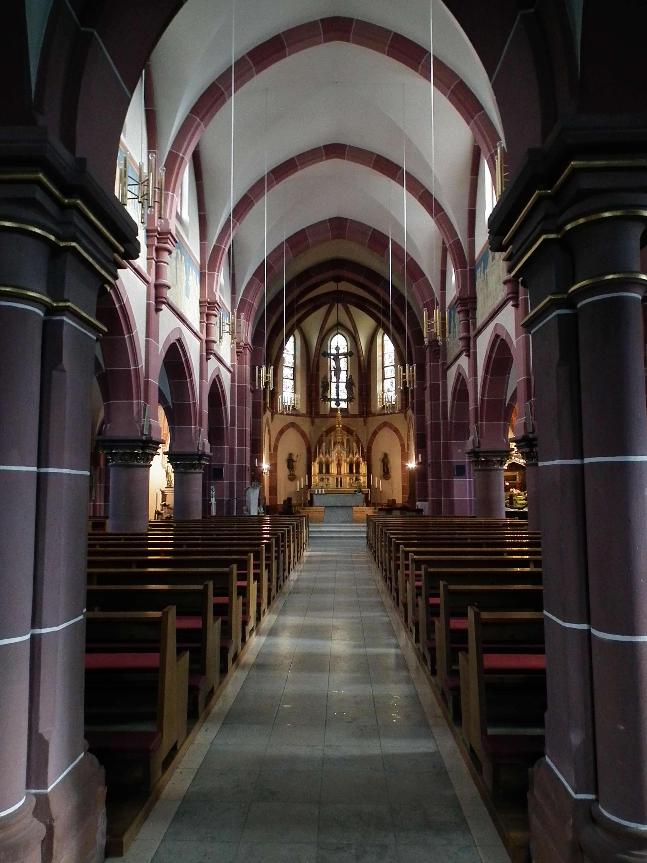 Katholische Kirche St. Nikolaus im Rodgauer Stadtteil Jügesheim (Hessen, Deutschland)